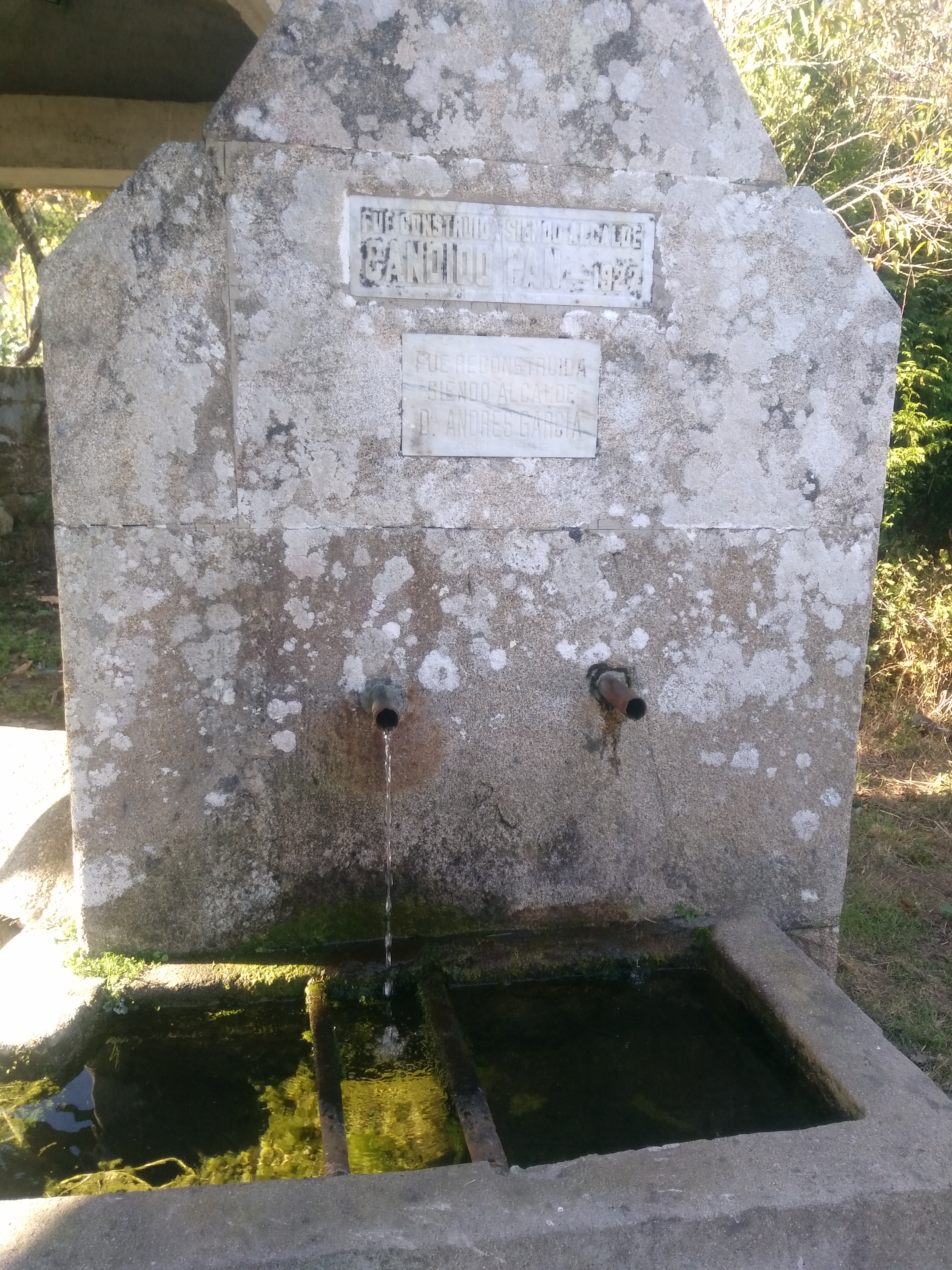 Fonte situada ao lado do lavadoiro